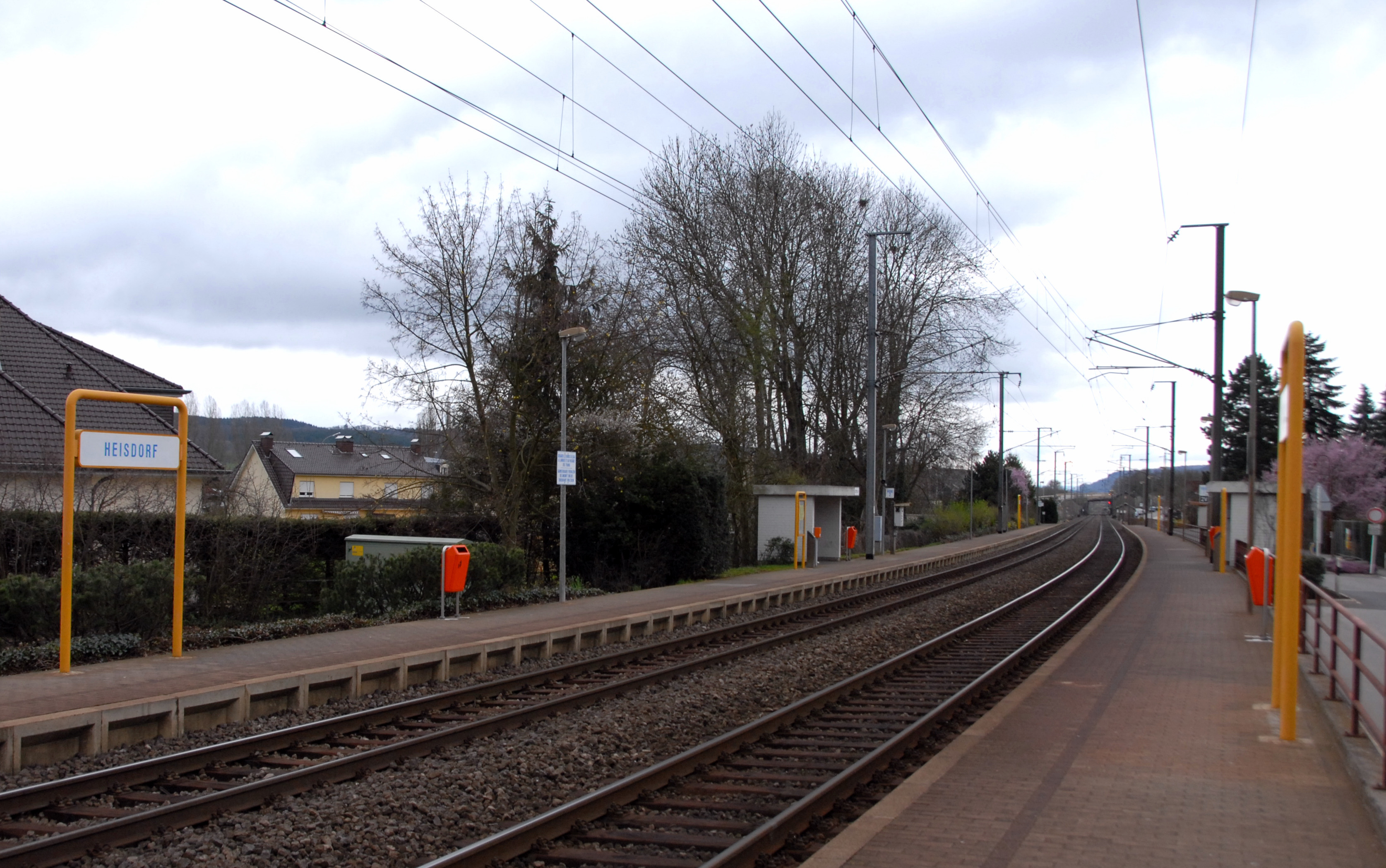 La gare de Heisdorf (Luxembourg)